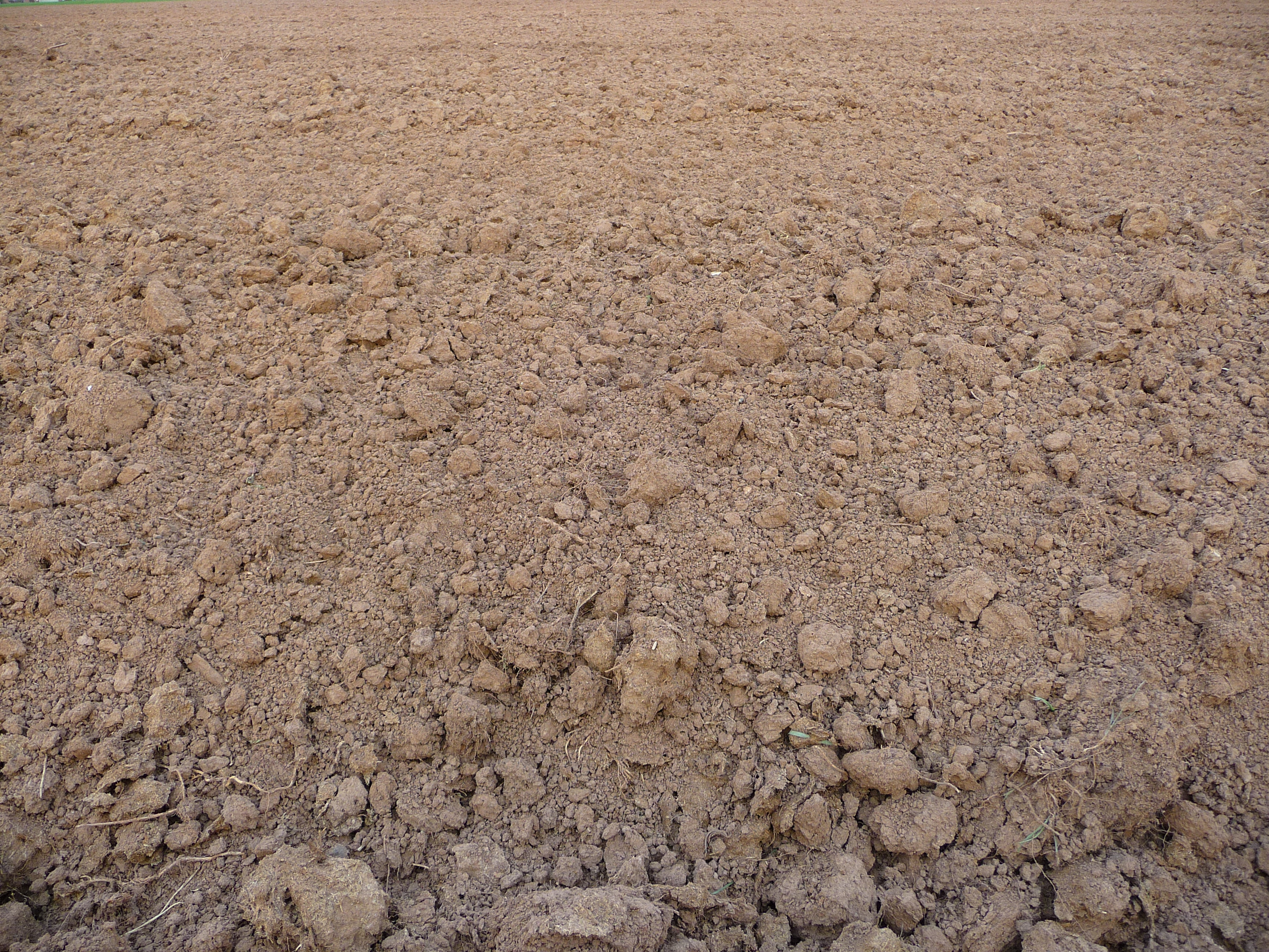 Ackerboden, fotografiert in Baden-Württemberg (Deutschland).